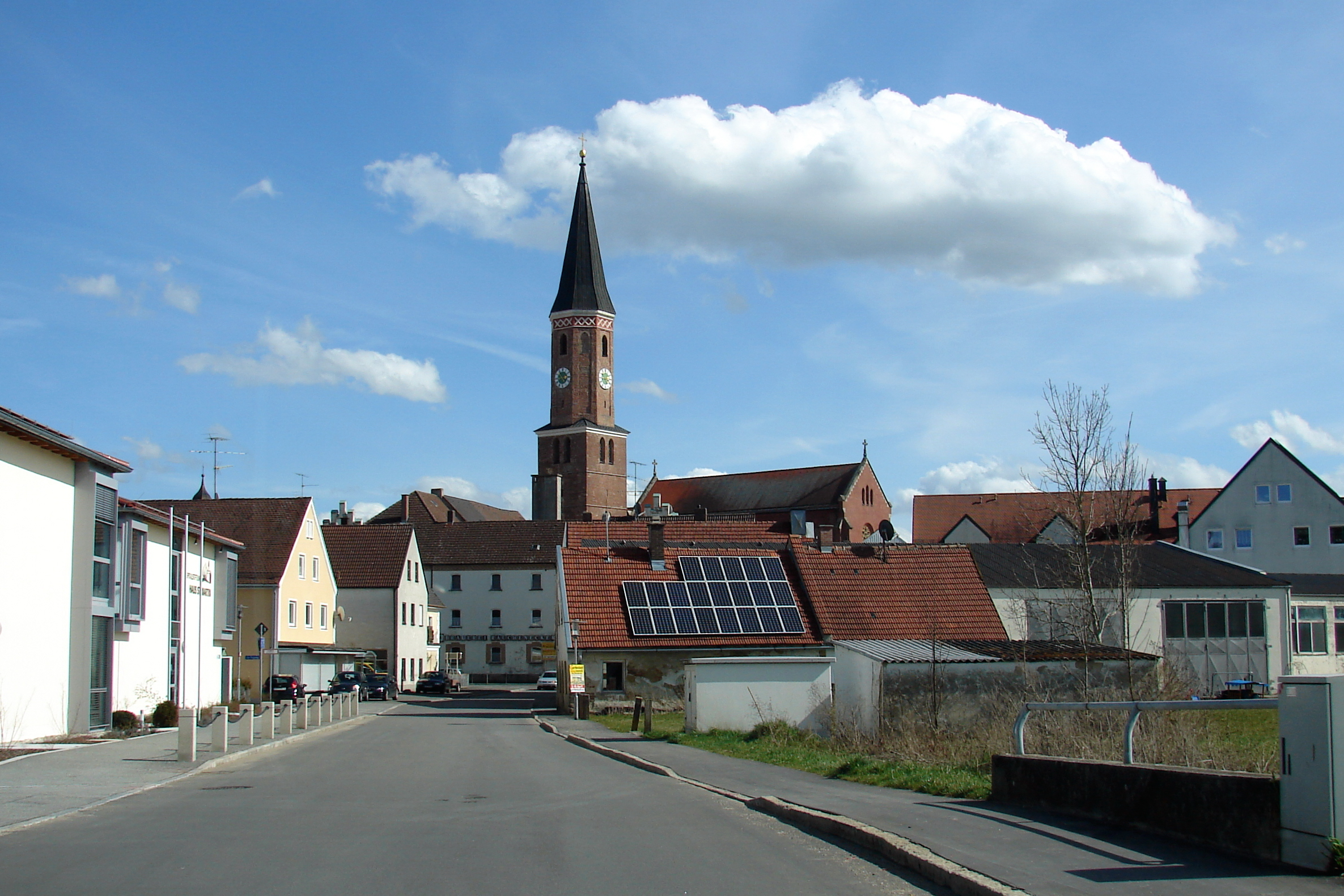 Ortkern mit Pfarrkirche St. Martin